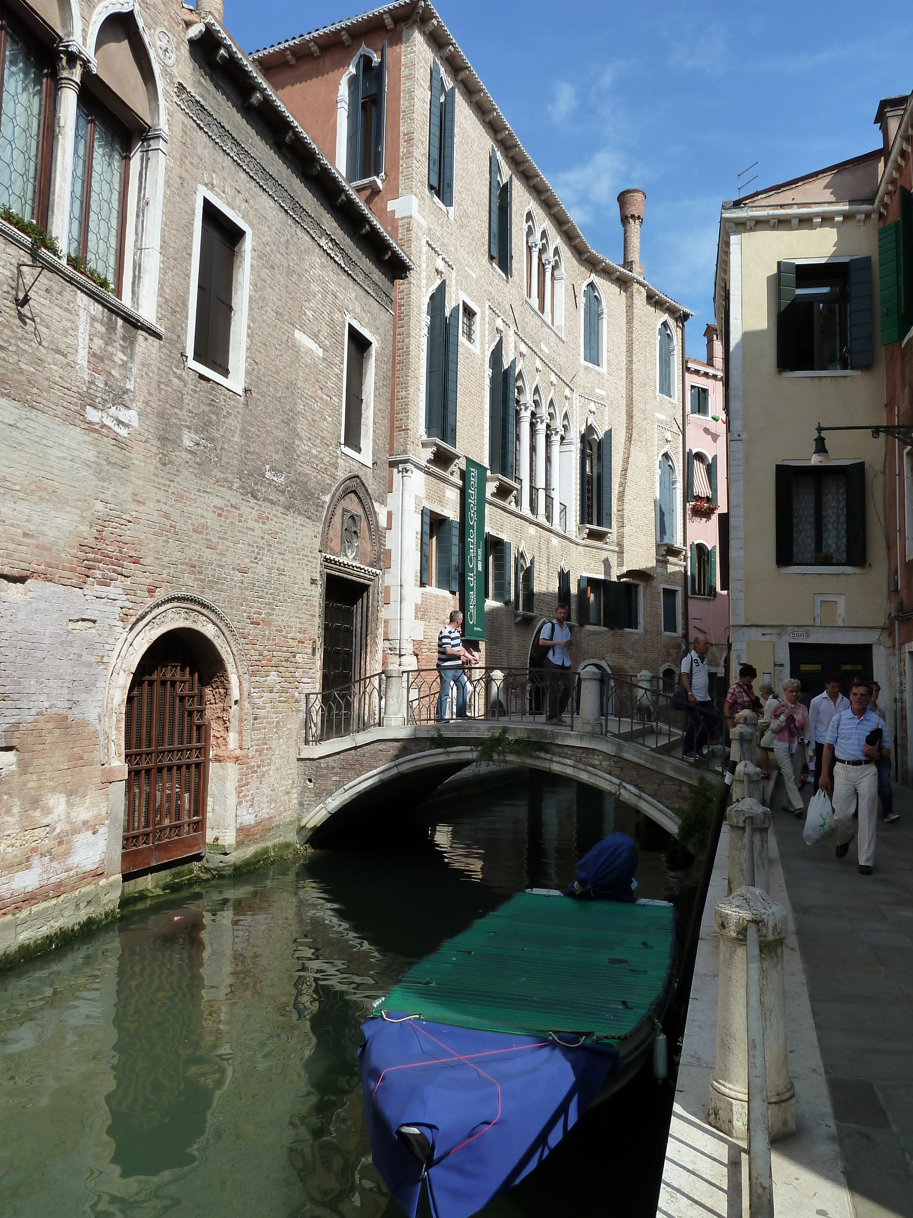 Palazzo Centani (Venice)